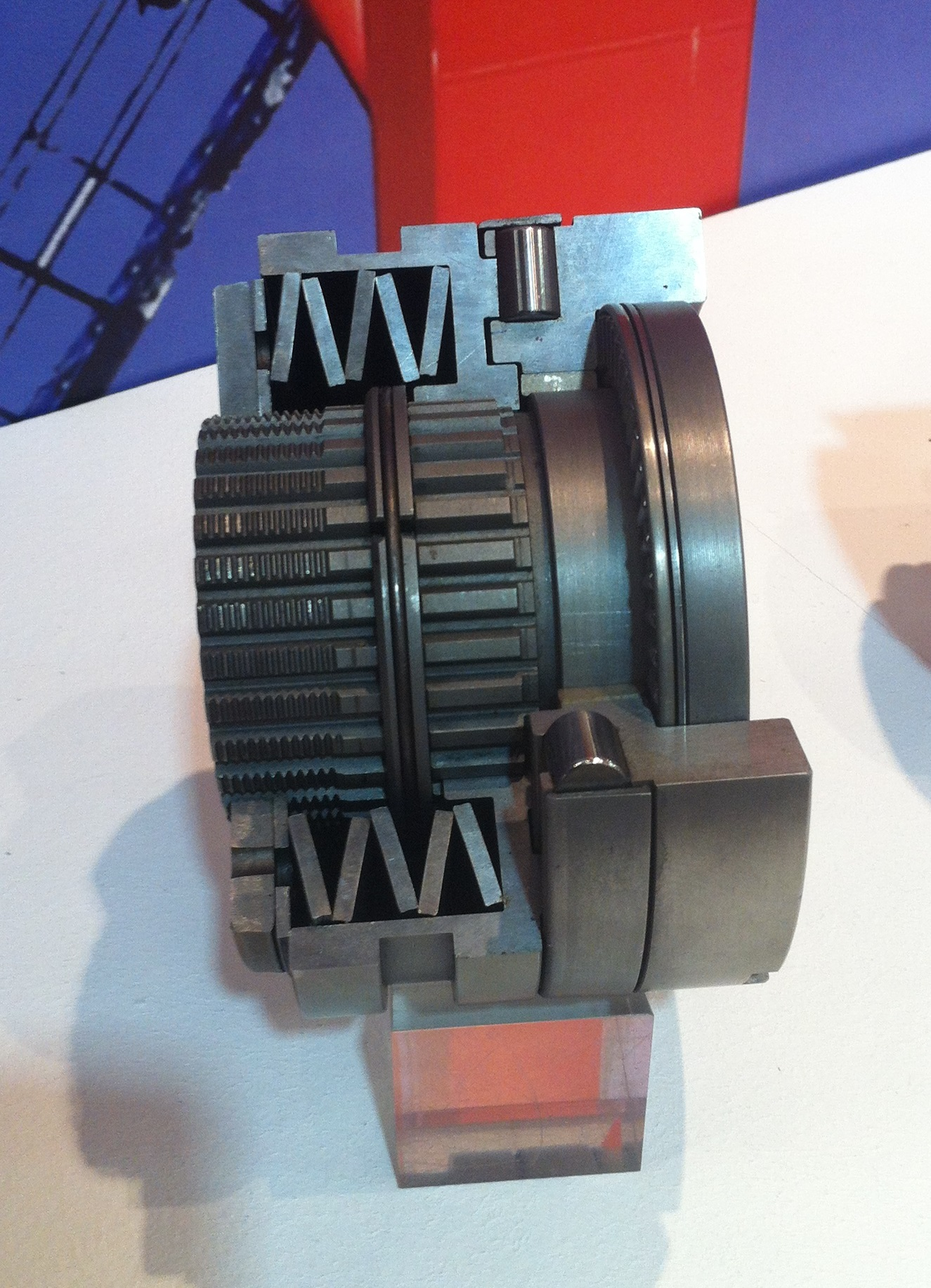 Gezien op Europort 2013 in Ahoy Rotterdam